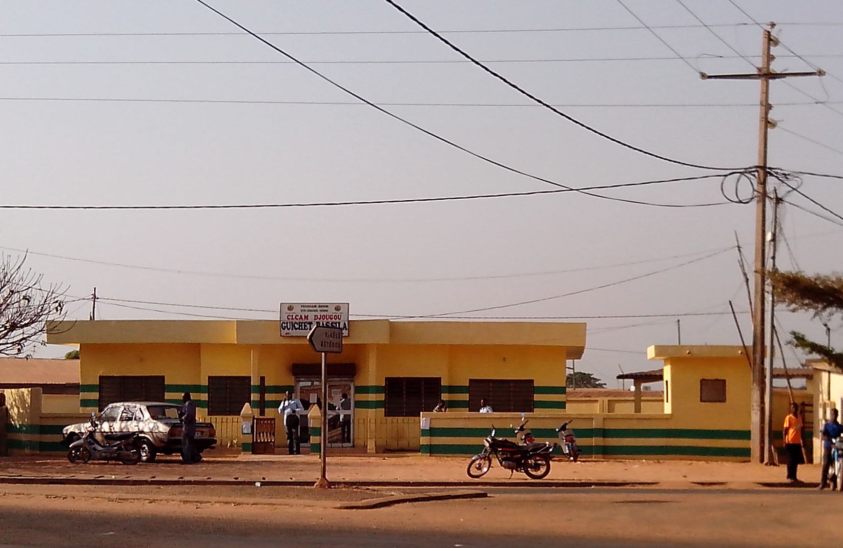 Bassila centre villa, le nouveau bâtiment de CLAM de 2013